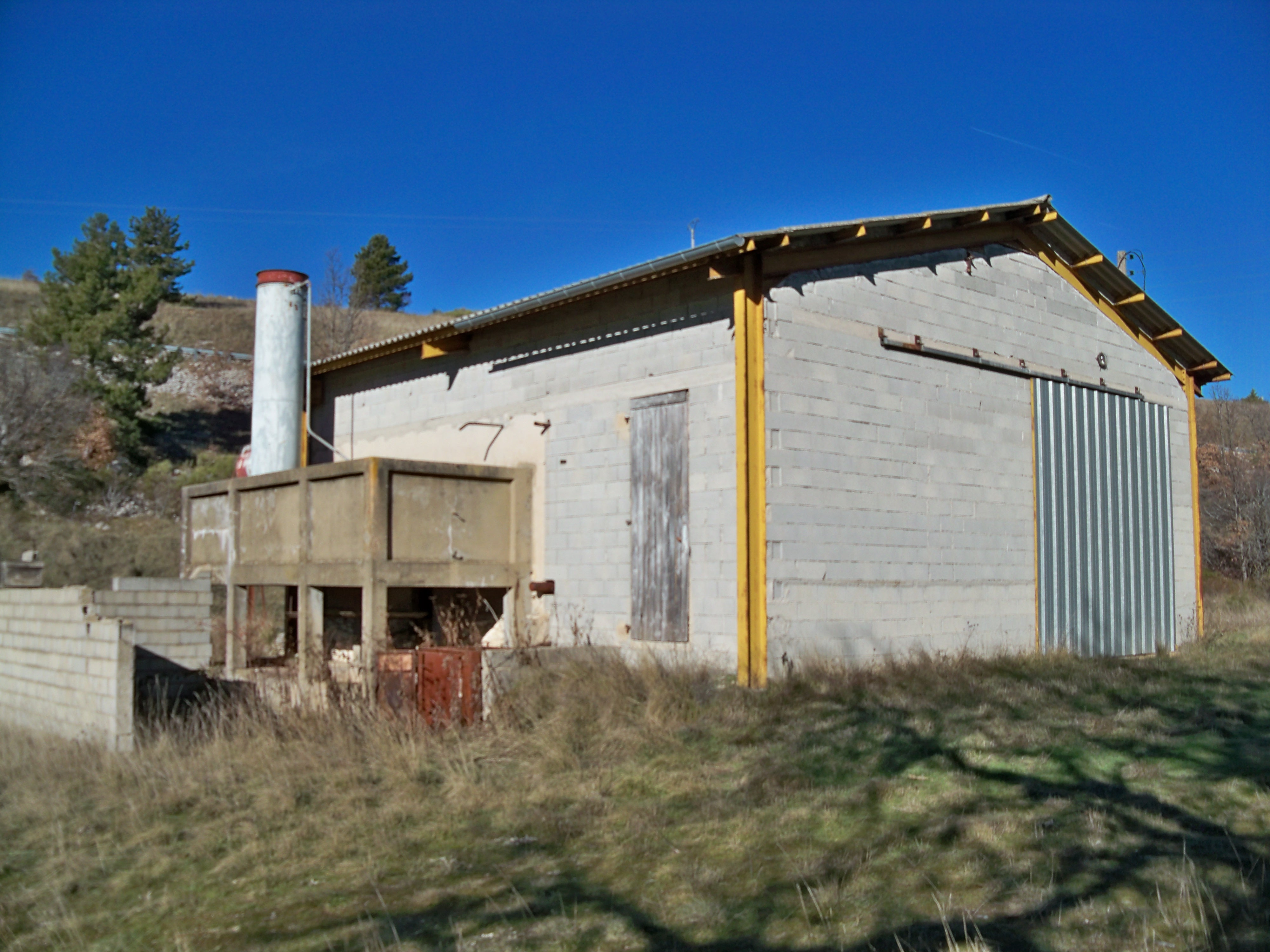 Distillerie de la Combe du Pommier, à Revest du Bion (04)